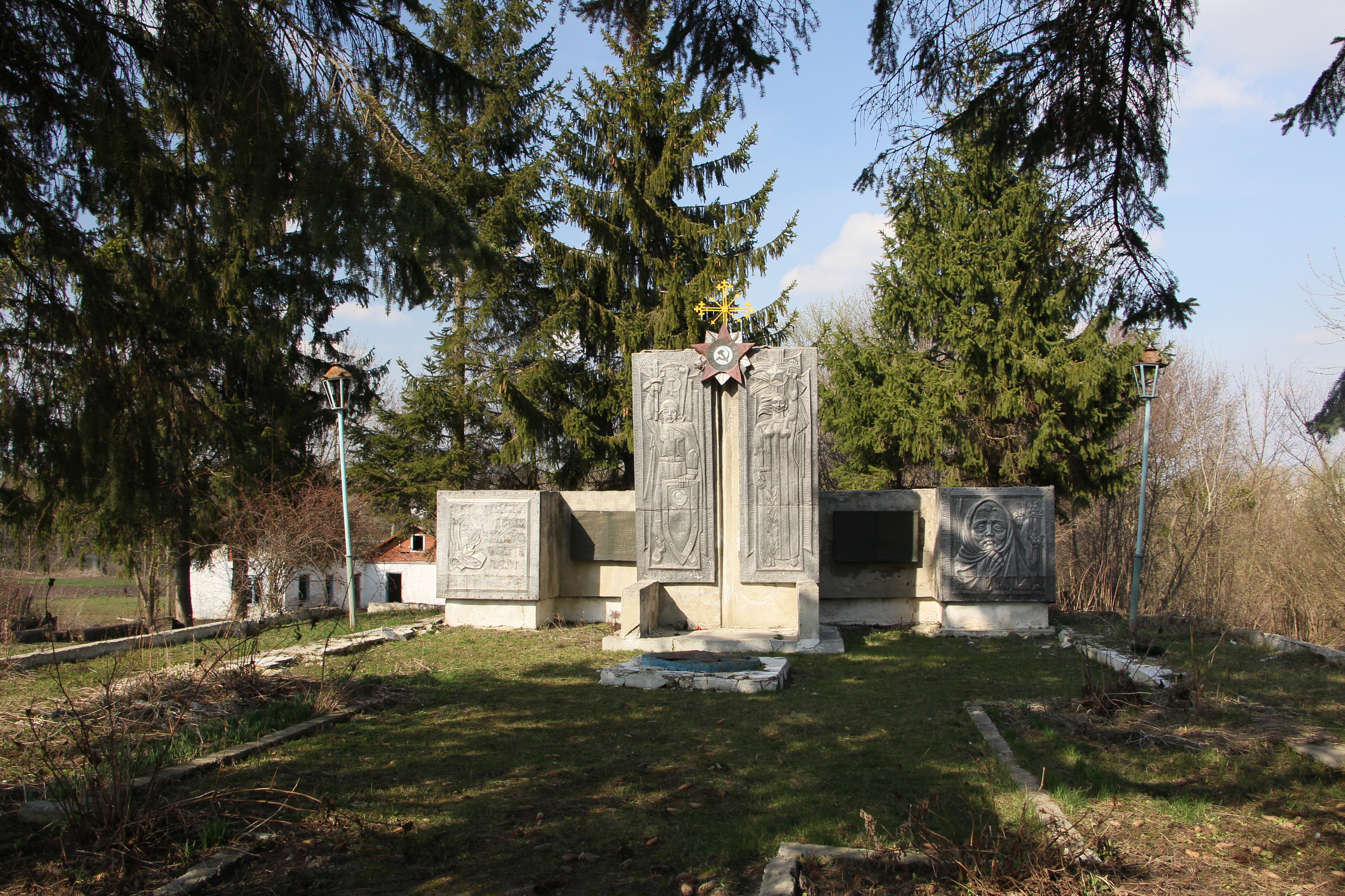 Пам'ятник в селі Загірці Лановецького району, Тернопільської області